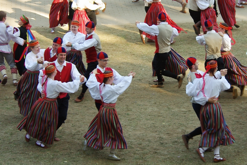 Rahvatantsurühma Torbikud tantsijad esimesel Kagu-Eesti tantsupeol.